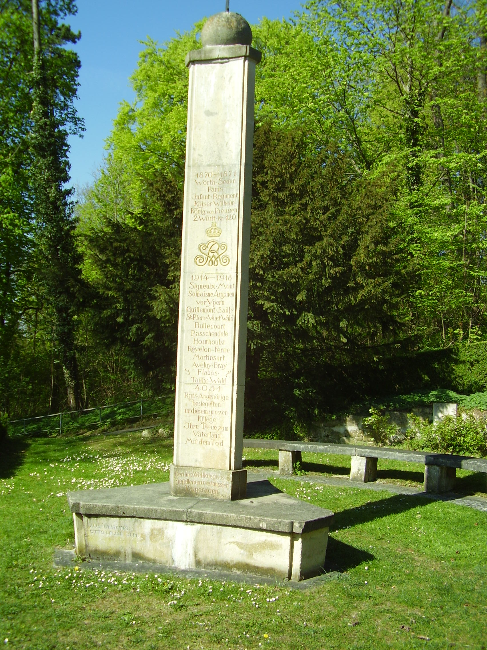 Kriegerdenkmal in Ulm am Michelsberg vor der Wilhelmsburg